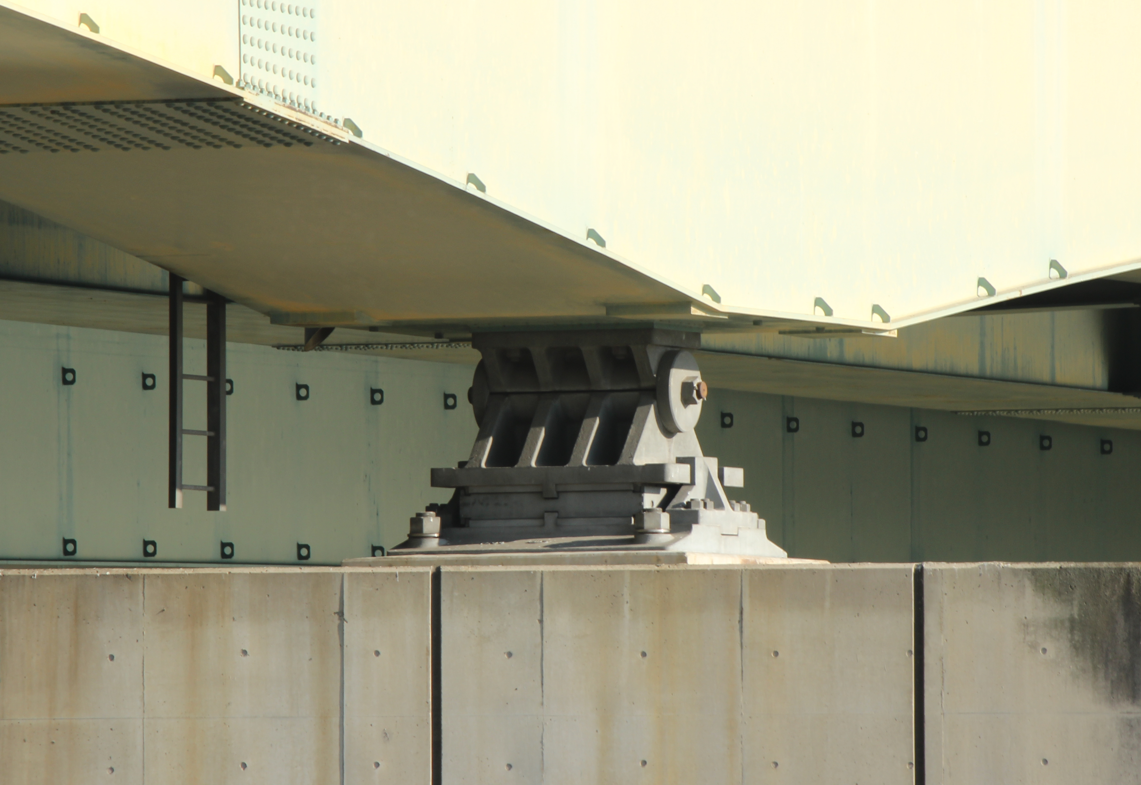 高架橋の支承